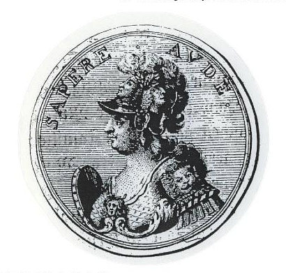 Medaille der Alethophilenː Vorderseite mit Brustbild der Minerva mit der Abbildung der Philosophen Leipnitz und Wolff auf dem Helm.